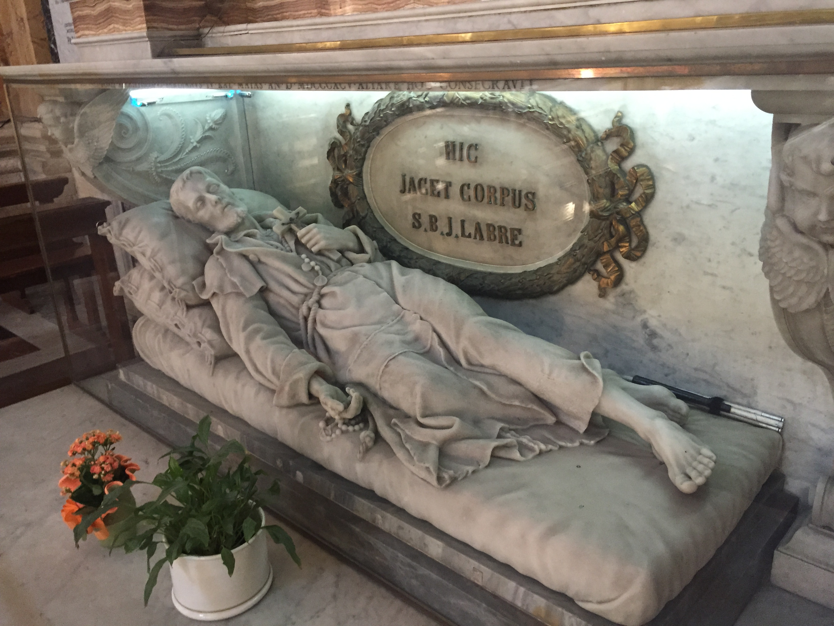 Tumba de Benito José Labre